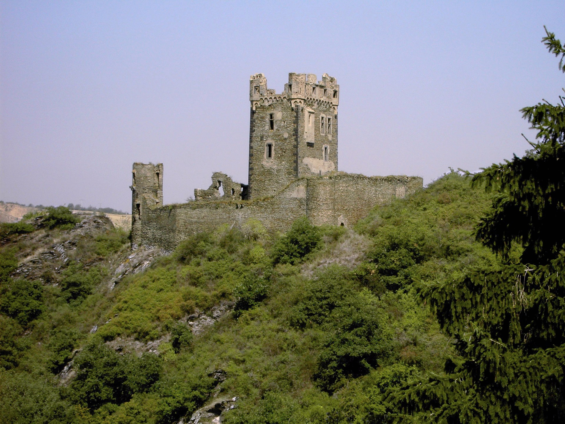 Burg Wernerseck